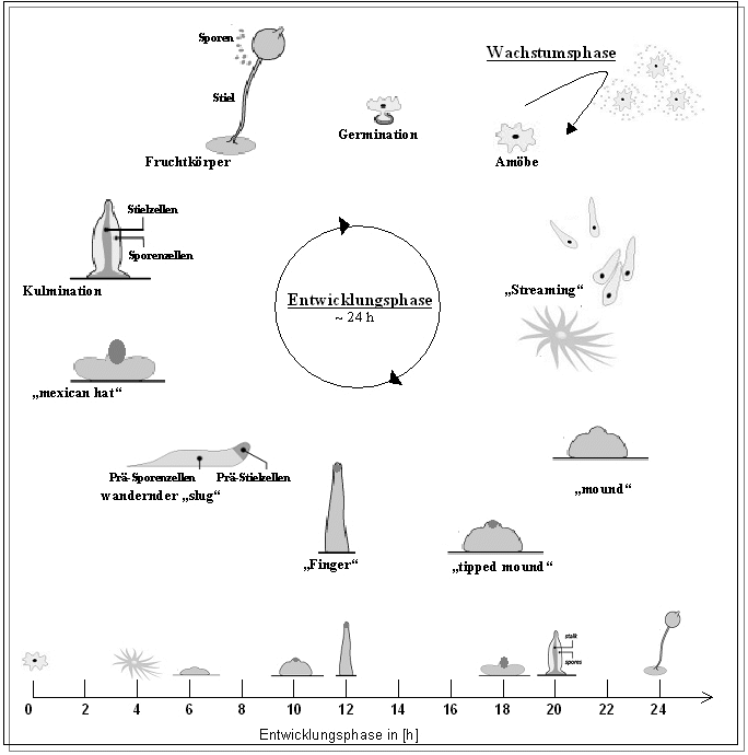 Dissertation: Monika Unha Baik, 2004 alte Version (File:Dictyosteliu_lifecycle.JPG) um überflüssige Ränder beschnitten und neu hochgeladen --Ericsteinert 10:38, 6 January 2006 (UTC)